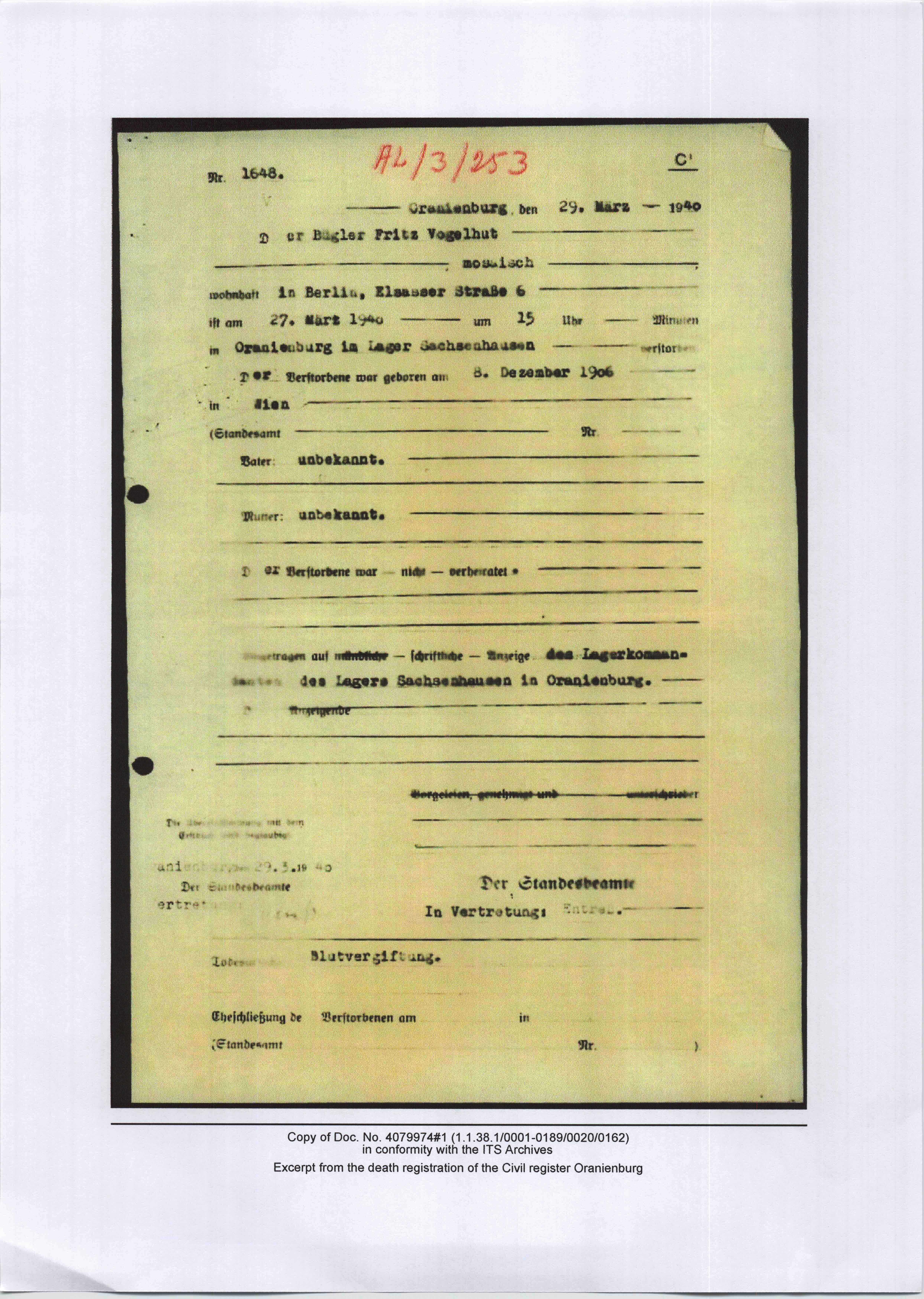 הודעה על מות פריץ פוגלהוט, אסיר במחנה זקסנהאוזן, הנושא אימות מארכיב ITS